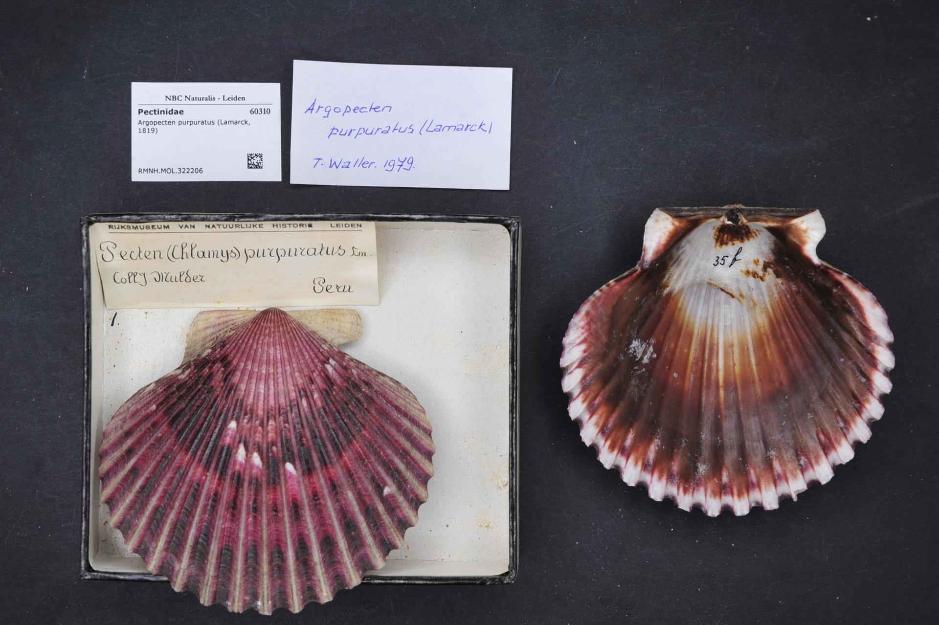 Argopecten purpuratus (Lamarck, 1819)